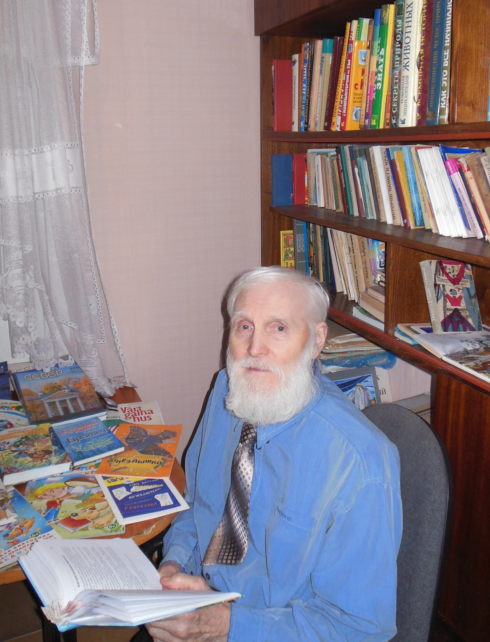 Детский писатель Игорь Востряков в своем кабинете